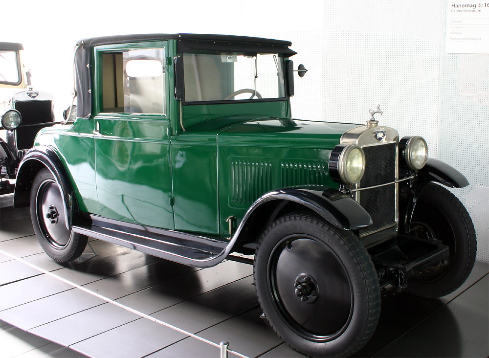 Hanomag 3/16 PS Fotografiert von Softeis, am 3.10.2004 im EFA-Museum für Deutsche Automobilgeschichte